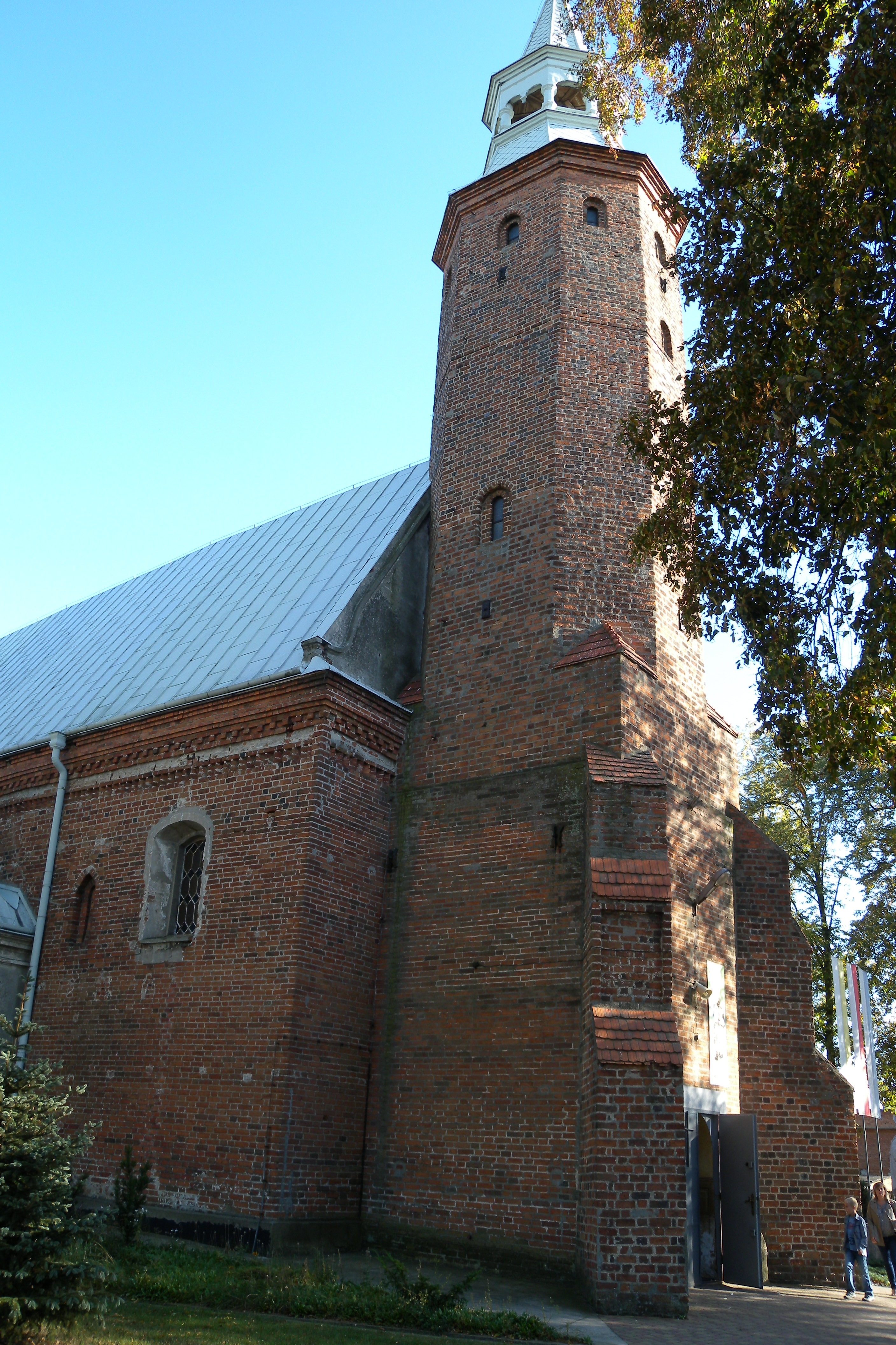 Buczek Kościół pw. św. Jana Chrzciciela